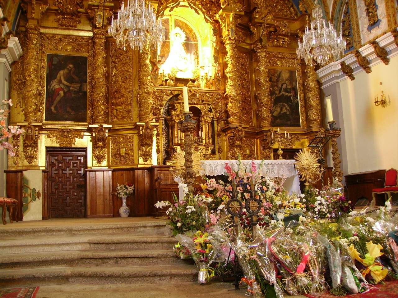 Retablo del altar mayor del santuario de la Virgen del Cubillo, en Aldeavieja, Ávila, España, en el año 2007